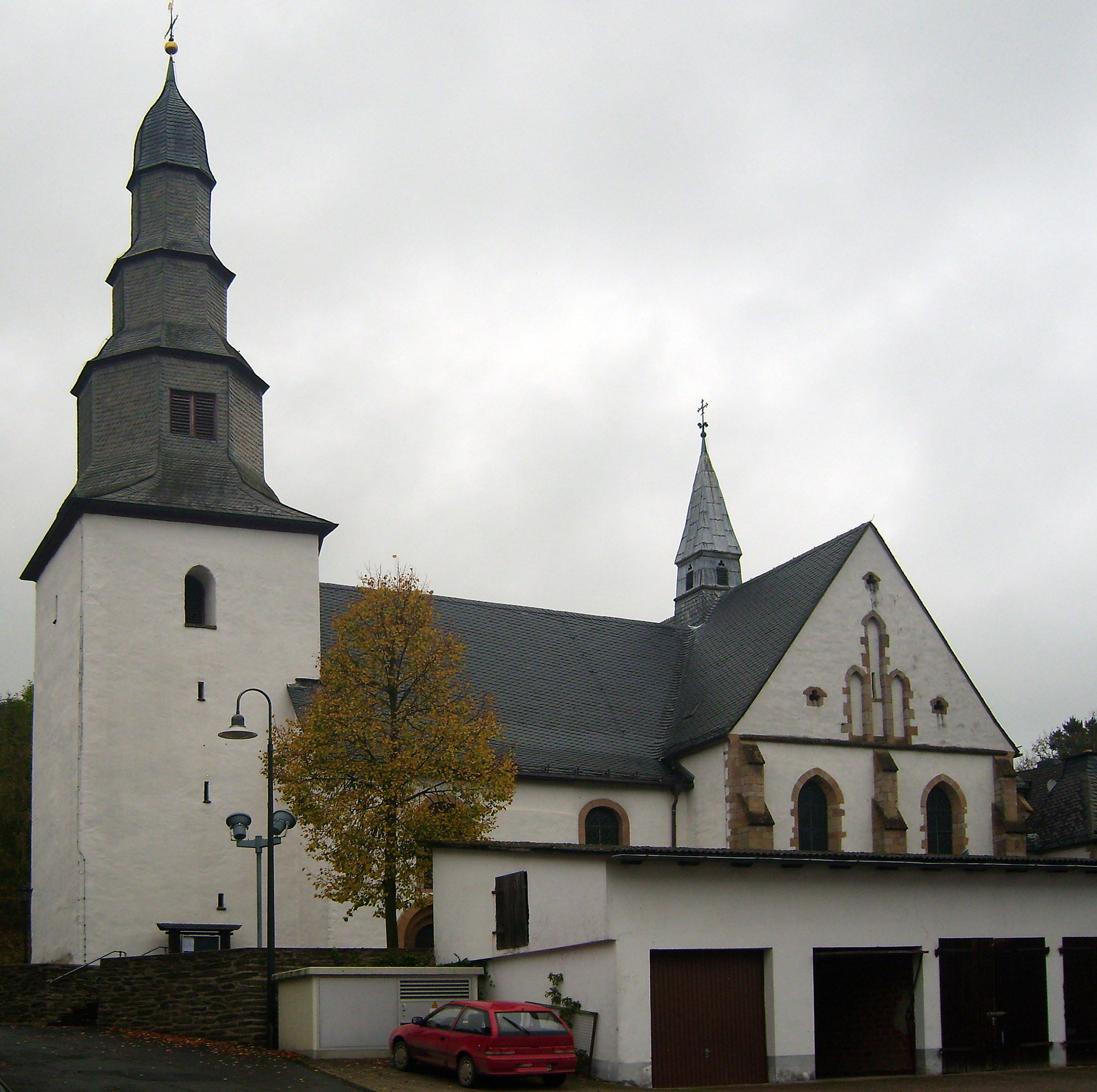 Sankt Johannes Baptist, Außenansicht, Deifeld This image shows a heritage building in Germany, located in the North Rhine-Westphalian city Medebach (no. 13).